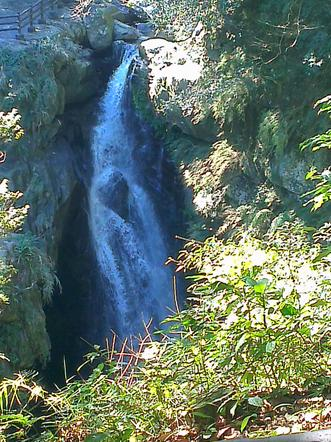 滿月圓瀑布